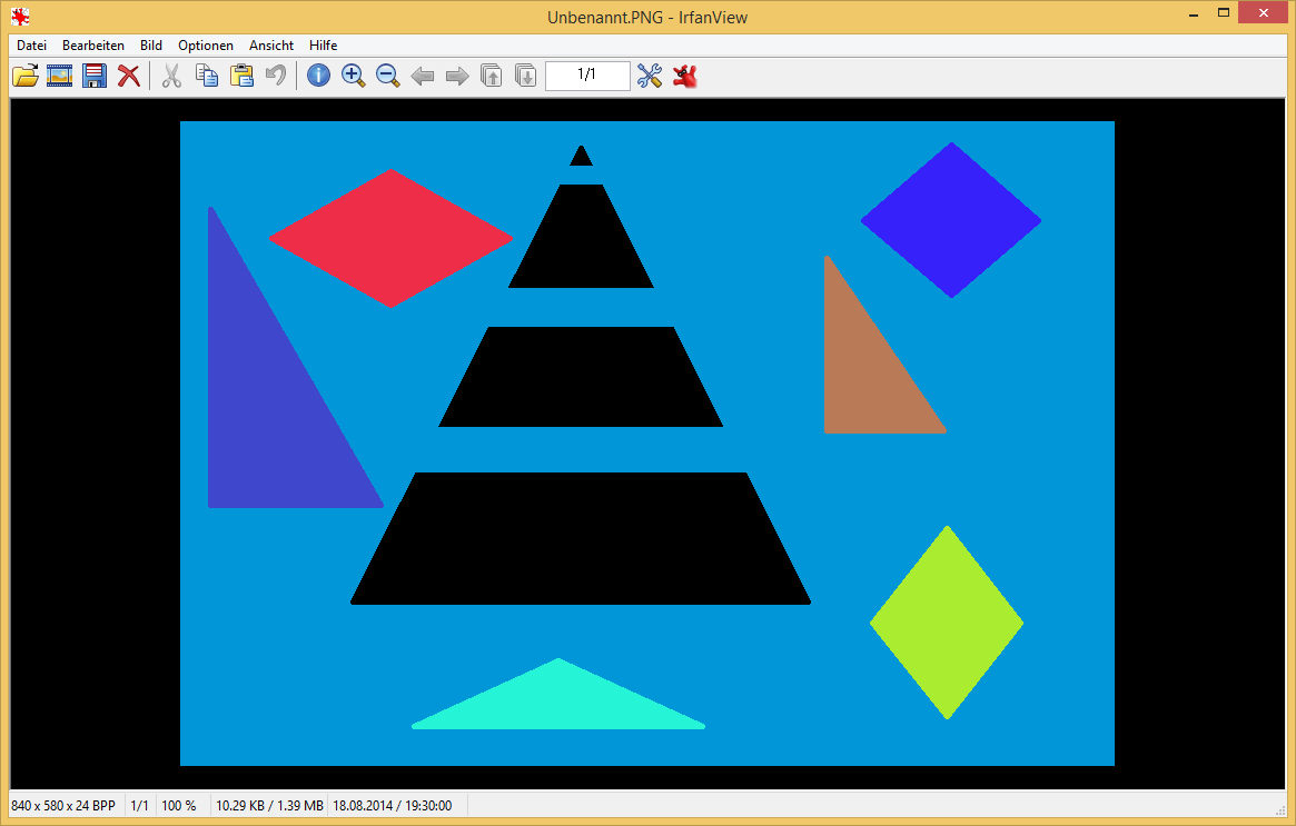 Deutscher Screenshot von IrfanView 4.38 (IrfanView)